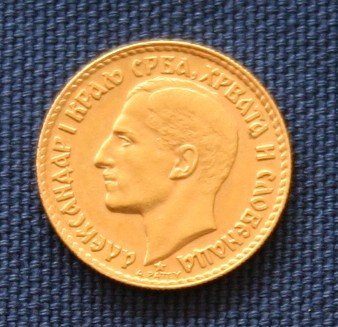 Alexander I, König von Jugoslawien